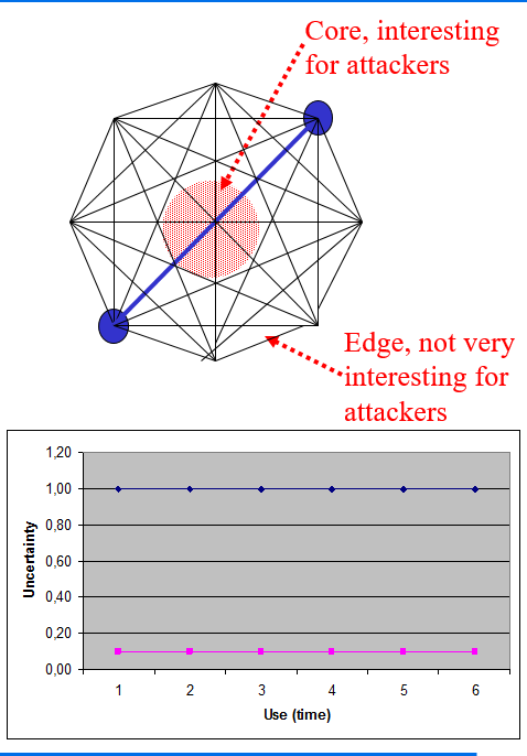 Монгол: v